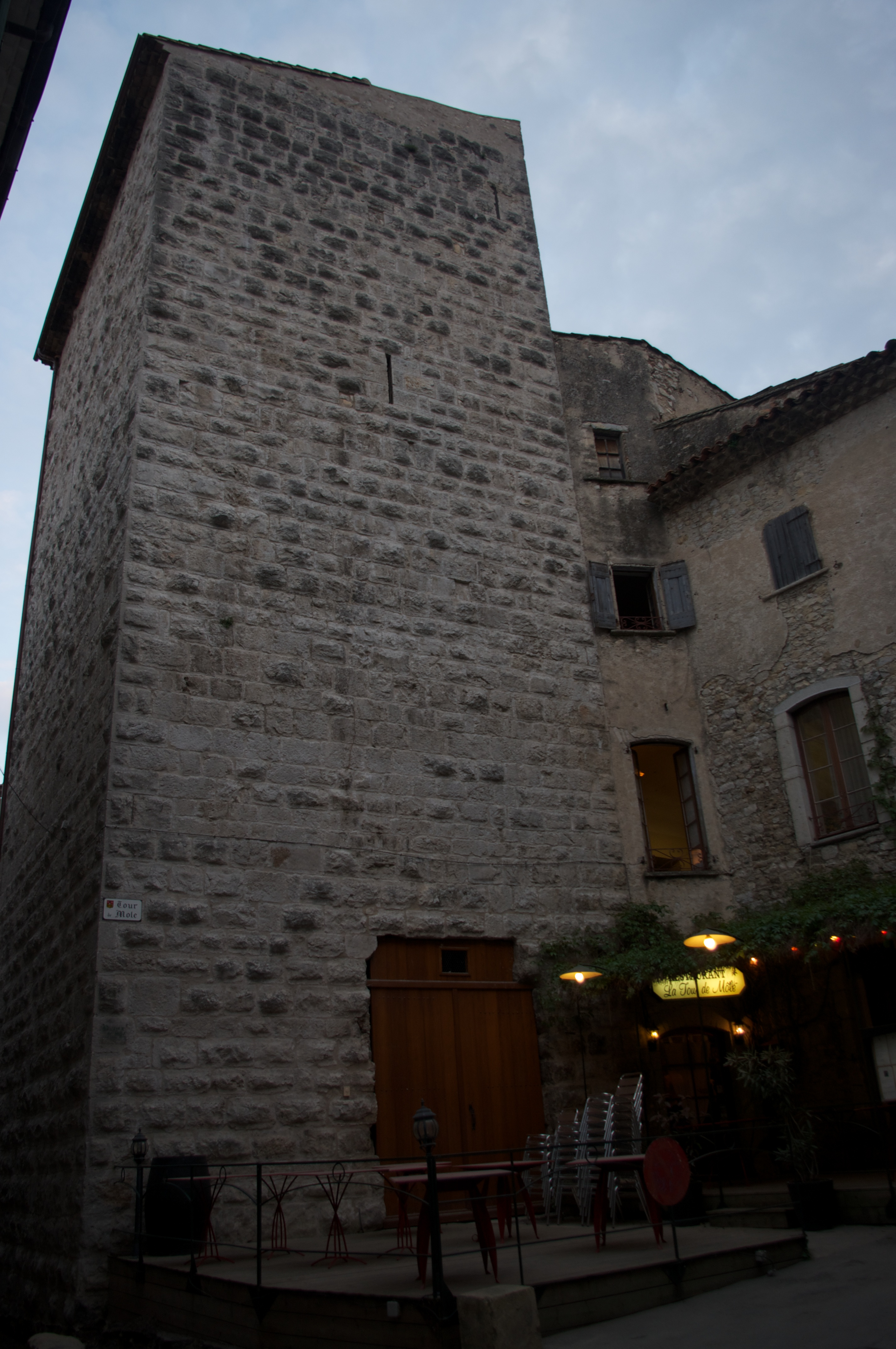 Tour vue de la place